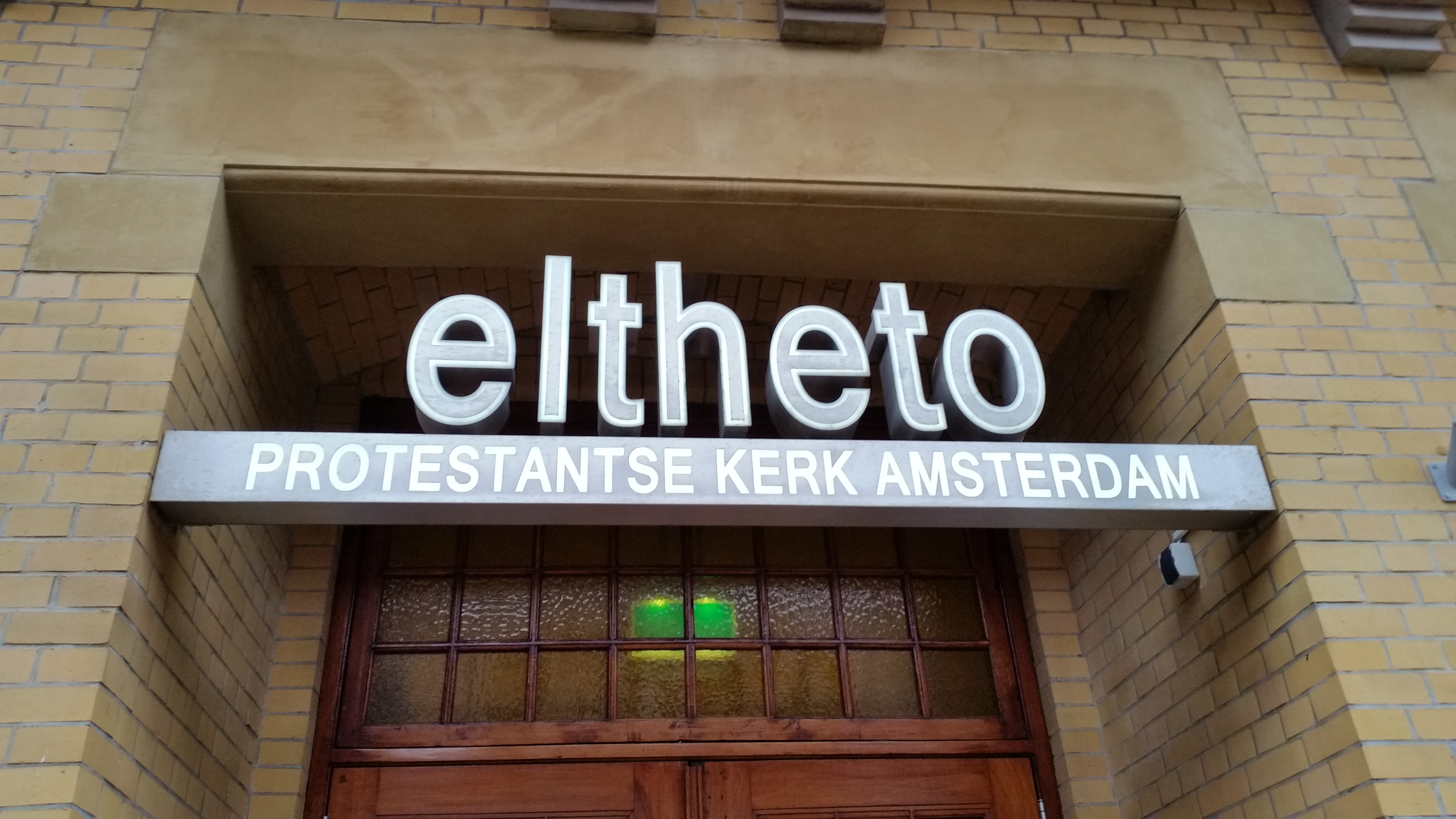 Het Elthetocomplex aan Javastraat 116-120, Amsterdam-Oost in januari 2020